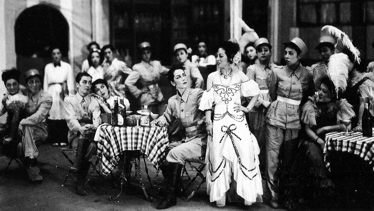 花組「再び君が胸に」。中央：越路吹雪(Koshiji Fubuki)・深緑夏代(Fukamidori Natsuyo)